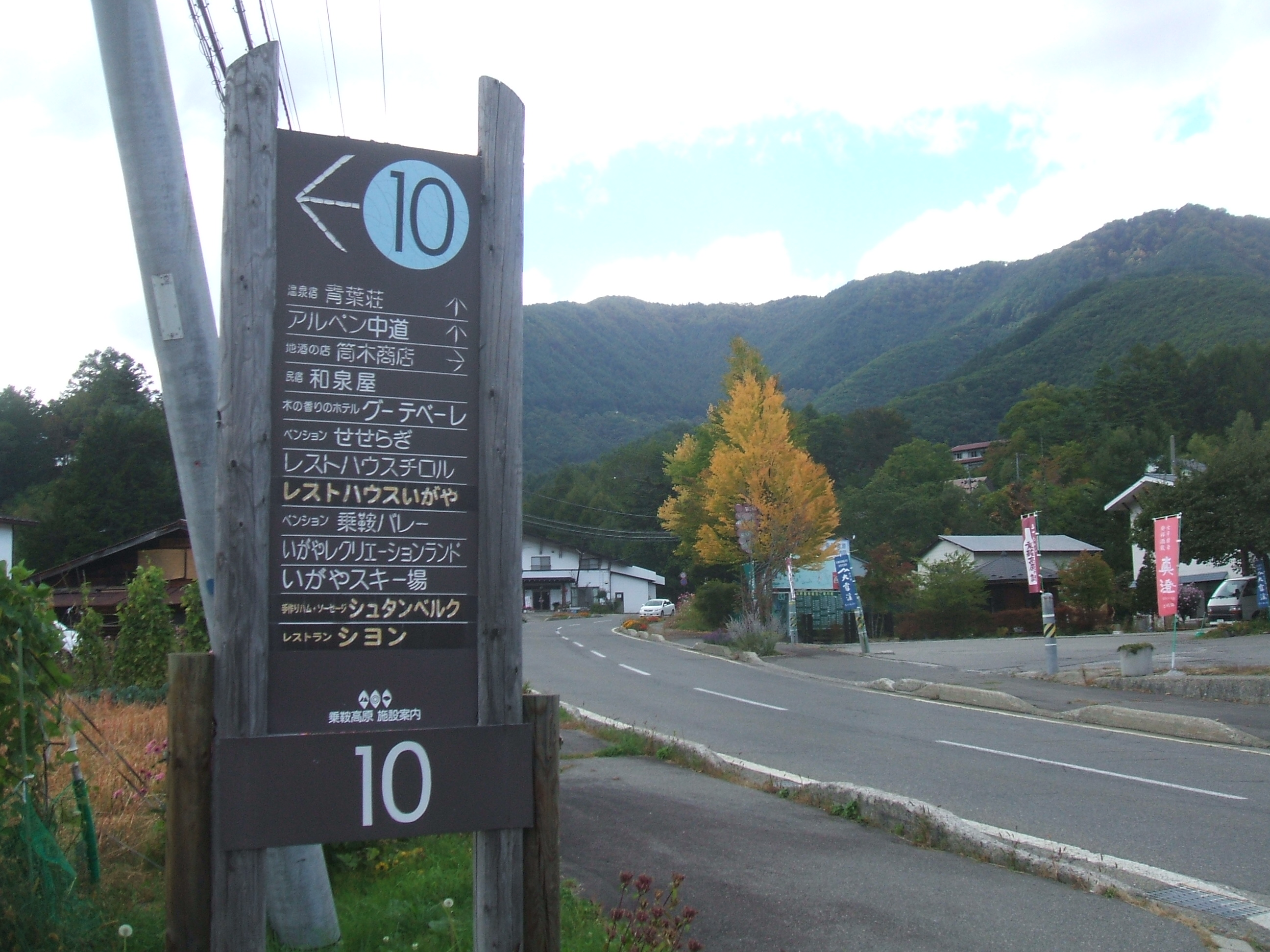 長野県松本市安曇地区で乗鞍高原にある大野川で宿泊施設などを明示するための標識